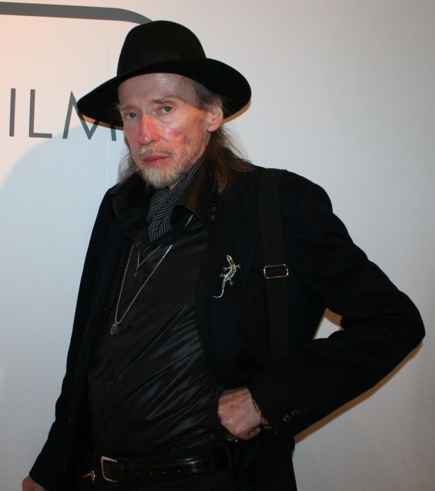 Regisseur Werner Schroeter (1945-2010) zu Besuch im Frankfurter Filmmuseum